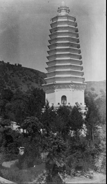 北京灵光寺招仙塔